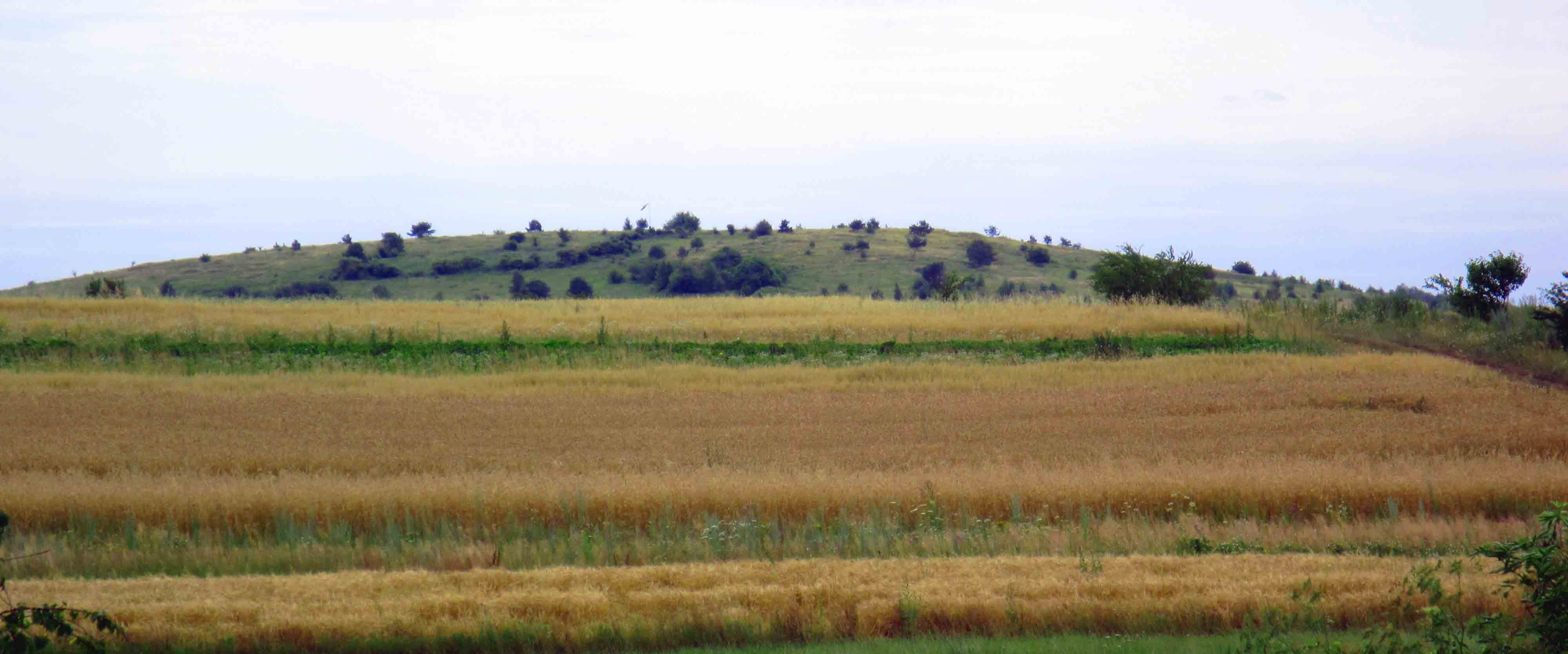 Вид на гору Гонтову з с. Мильне Зборівського району Тернопільської області